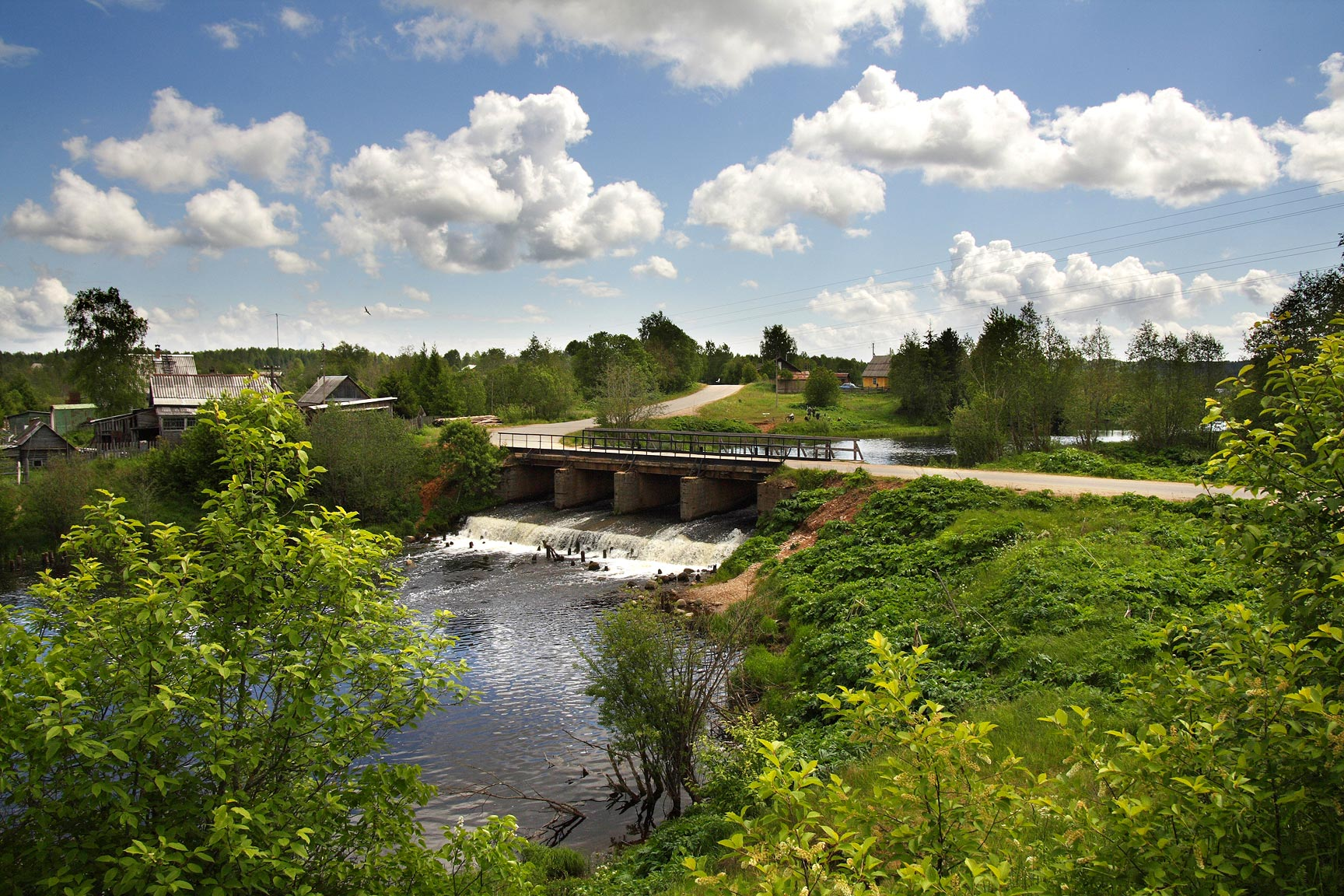 Плотина в д. Окулово. Dam, Okulovo.